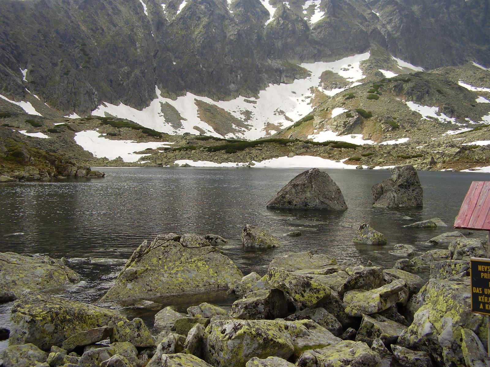 Batizovské pleso ve Vysokých Tatrách